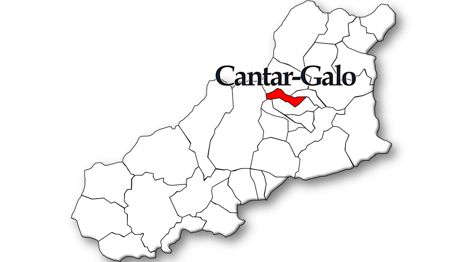 População